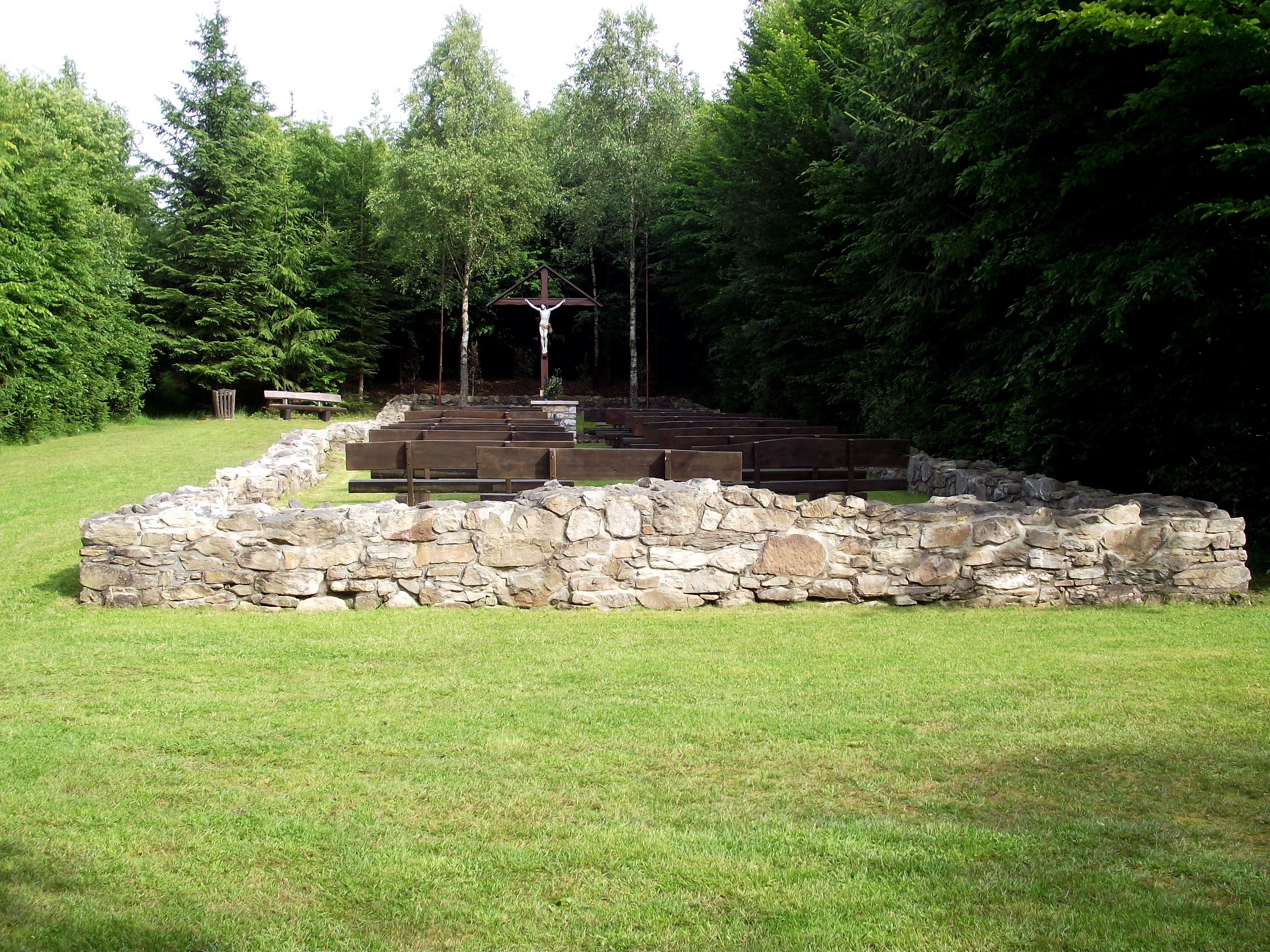 Grundsteine und Fundament der Eremitage Maria Reizenborn